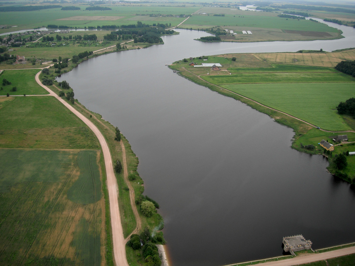 Vaizdas iš viršaus